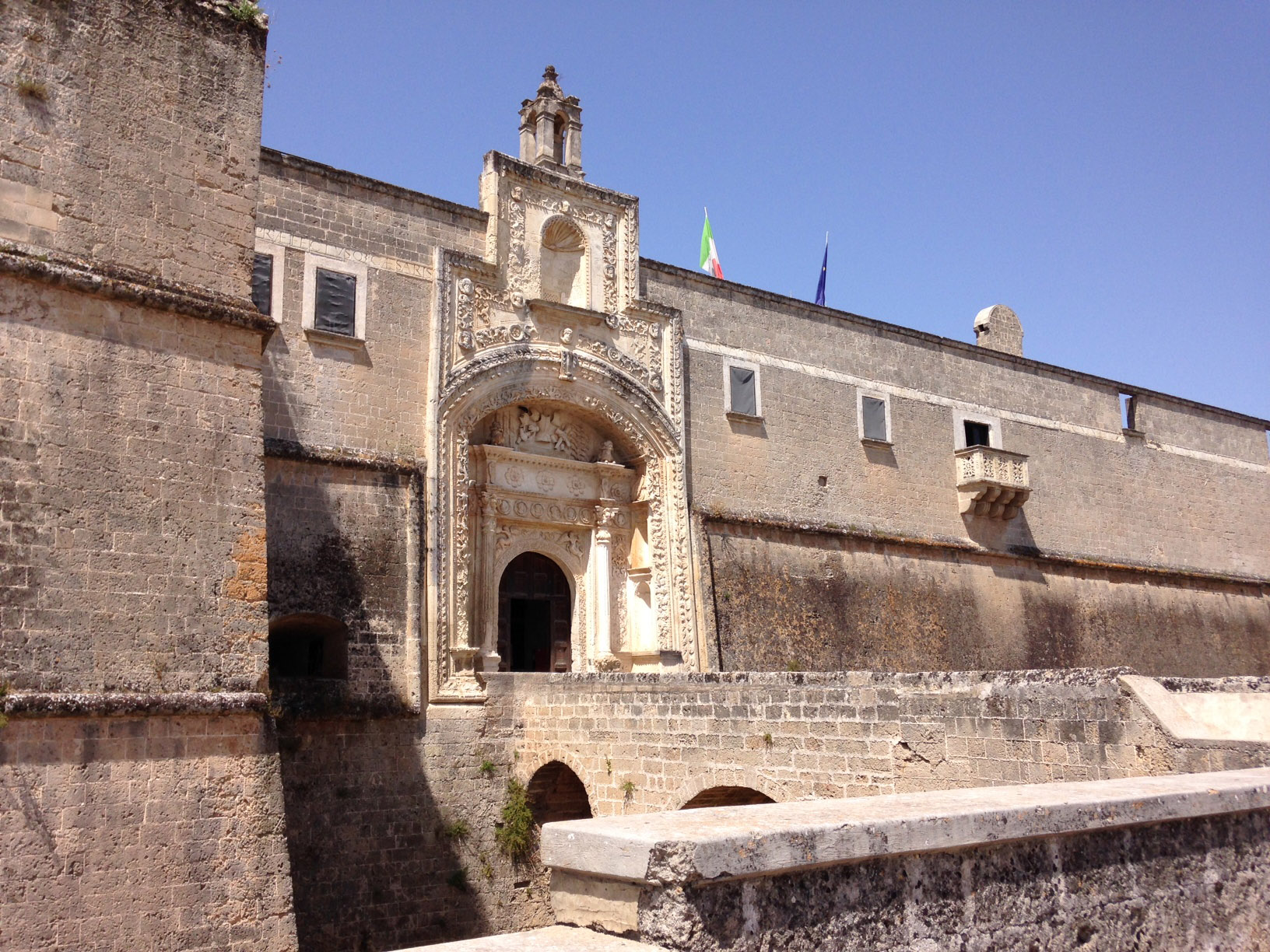 Facciata del Castello di Copertino This is a photo of a monument which is part of cultural heritage of Italy.